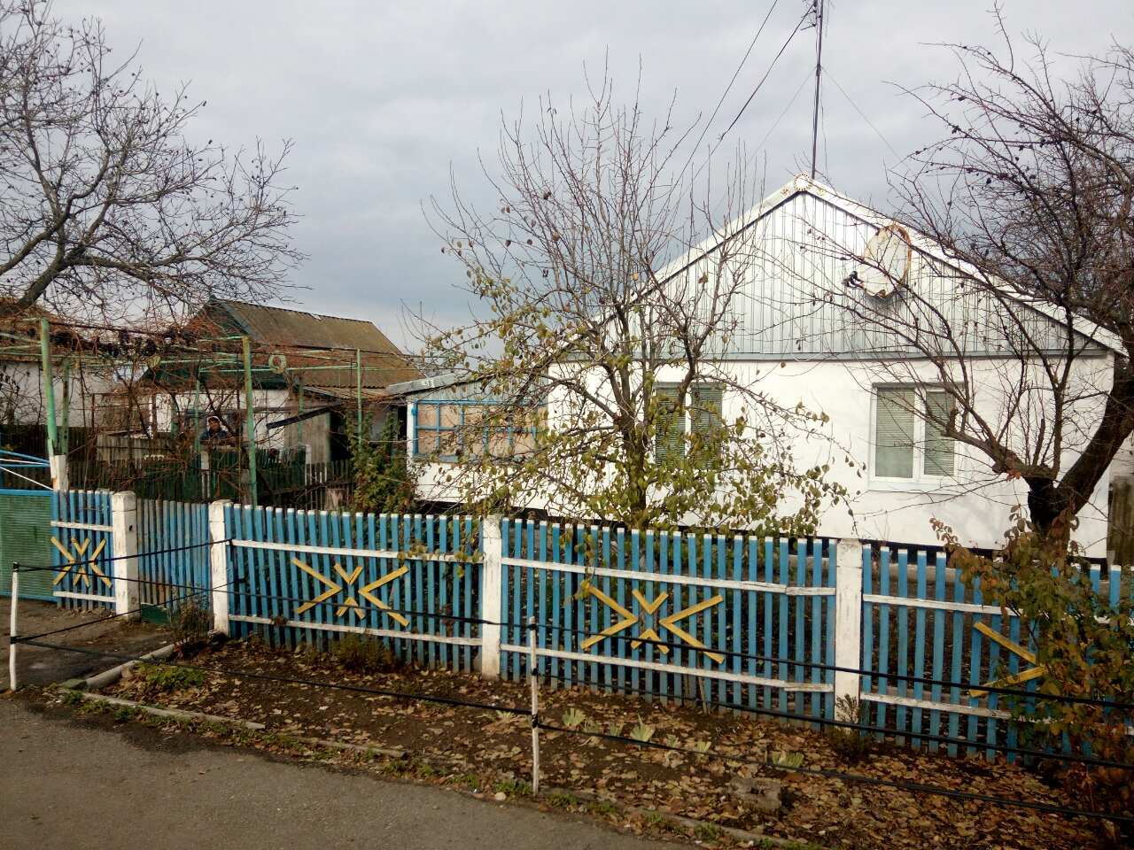 Жилой дом